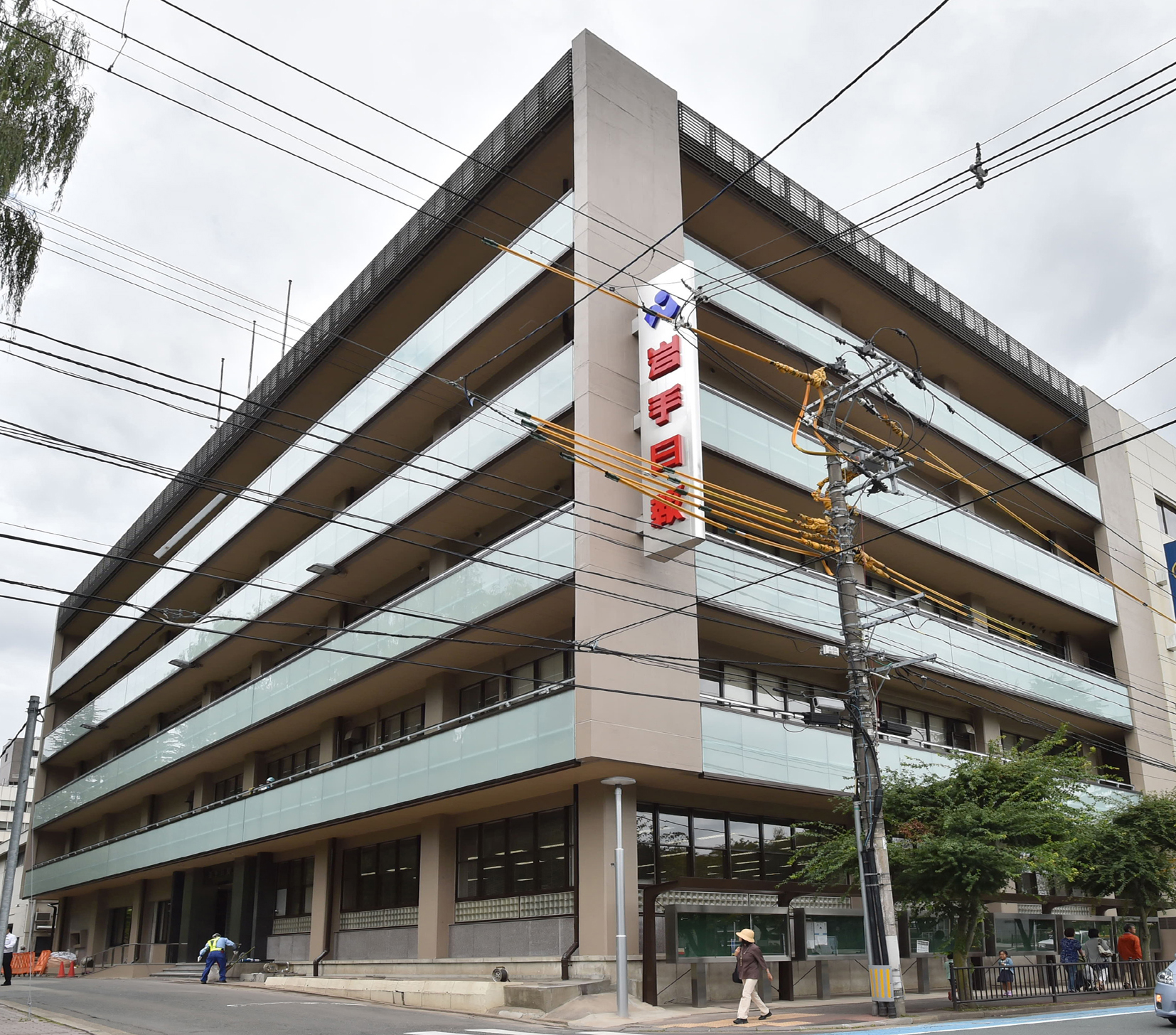 岩手日報本社